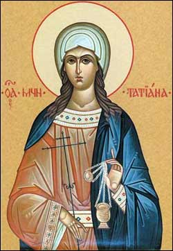 Святая Татиана (Татьяна)